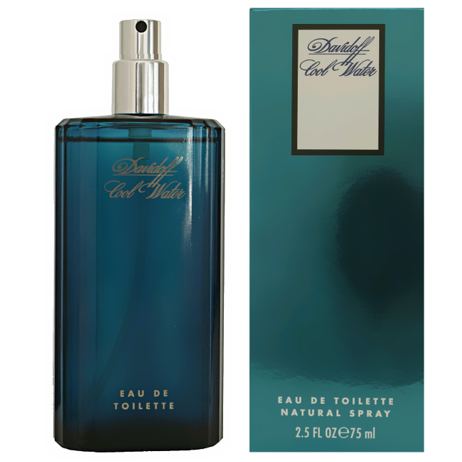 Cool Water parfum pack van Davidoff